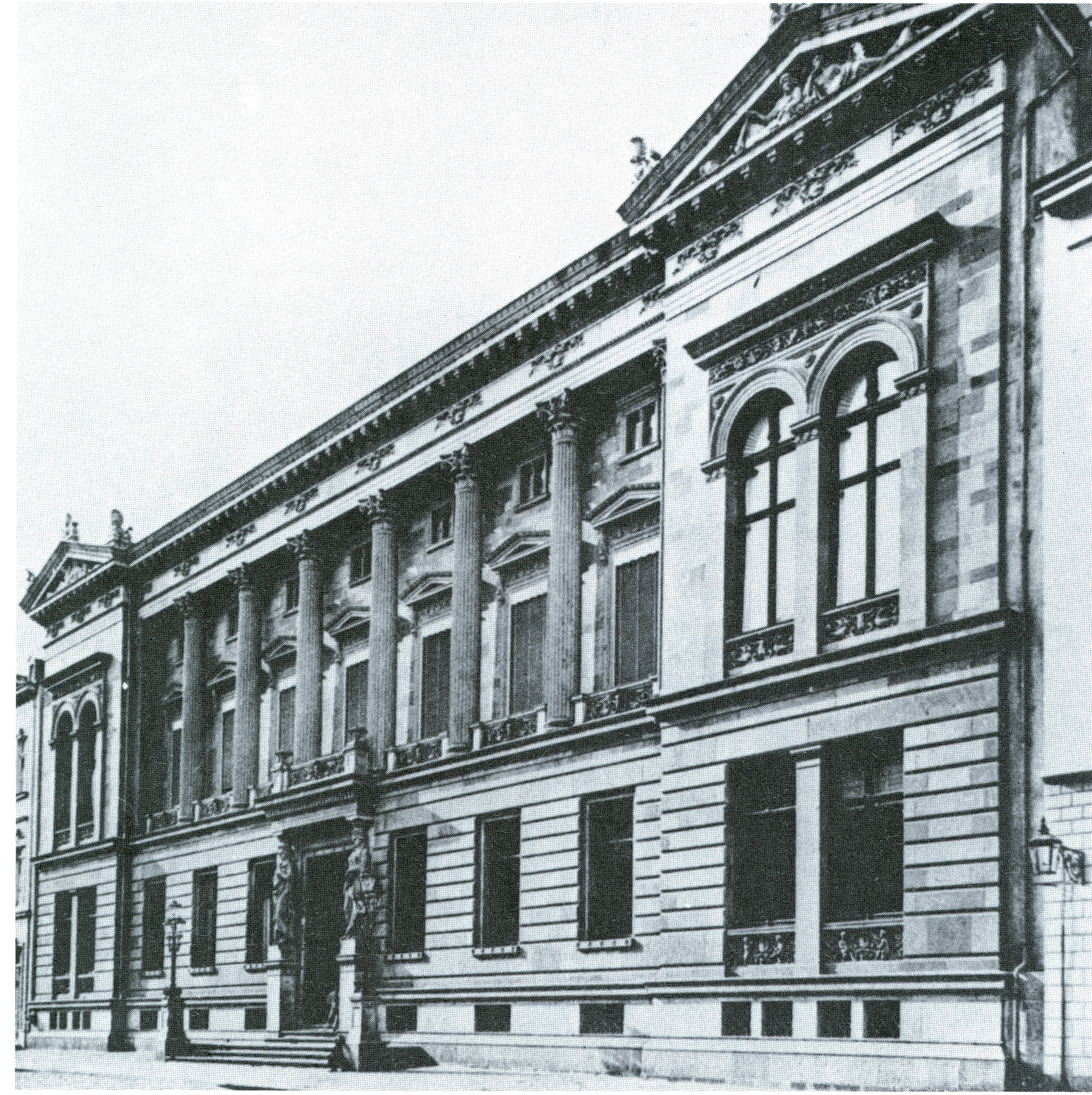 A. Schaaffhausen’sche Bankpalais, Unter Sachsenhausen 4 in Köln, erbaut 1859–1862 durch den Kölner Architekten Hermann Otto Pflaume vor dem Umbau von 1902.jpg